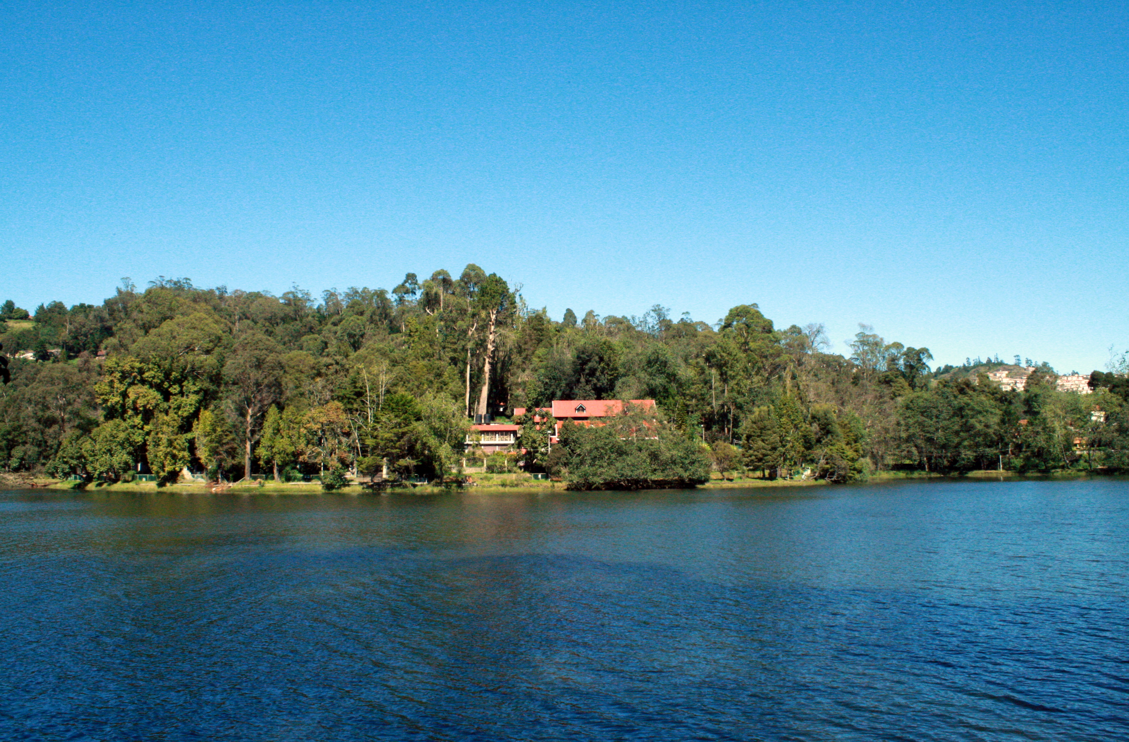 கொடைக்கானல் நகரத்தில் உள்ள ஏரியின் காலை நேரத் தோற்றம்.